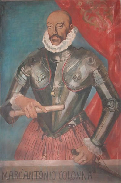 Marcantonio Colonna (Lanuvio, 1535 – Medinaceli, 1º agosto 1584) è stato un ammiraglio italiano e viceré di Sicilia.